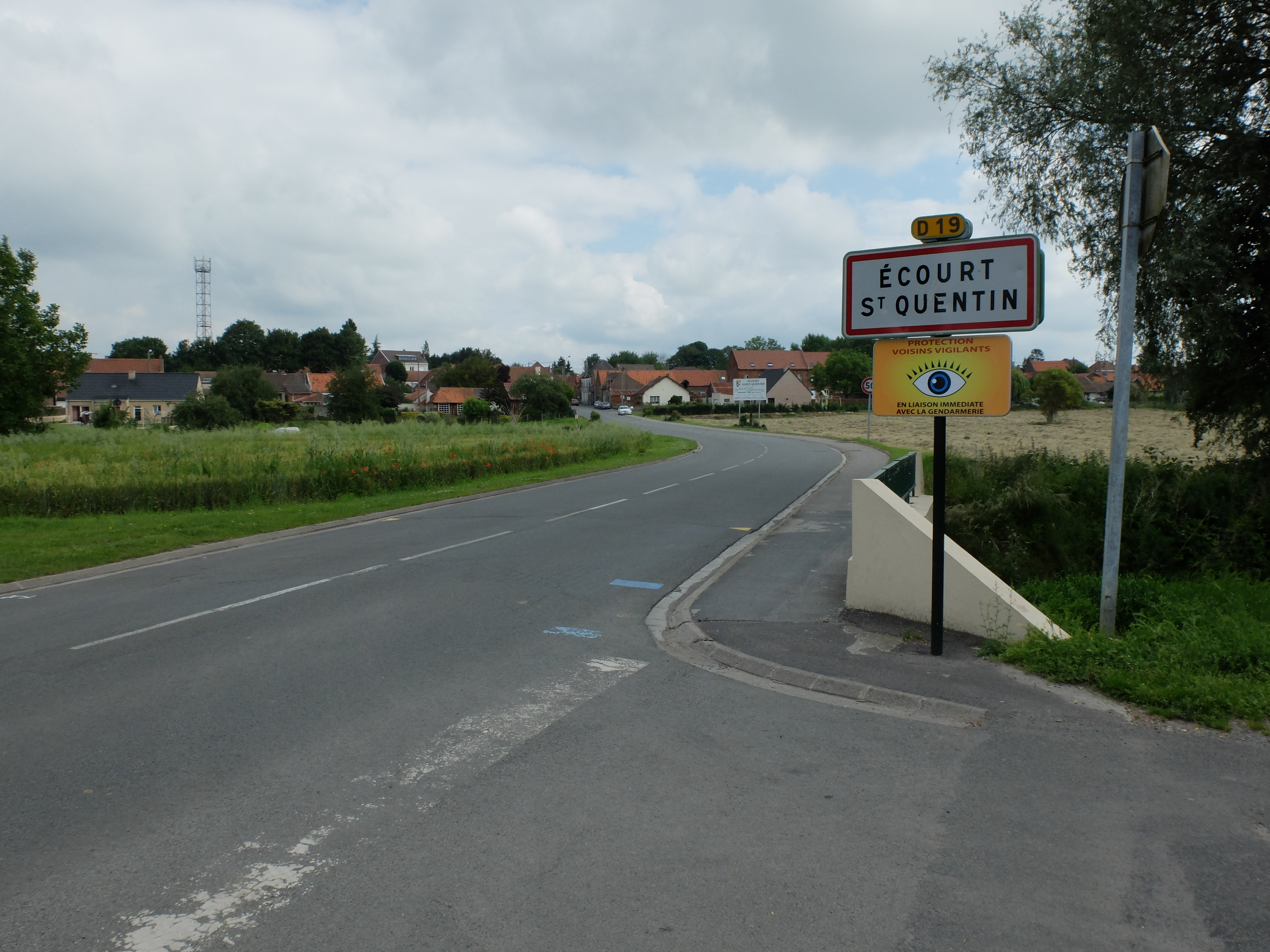 Vue d'une entrée d'Écourt-Saint-Quentin.